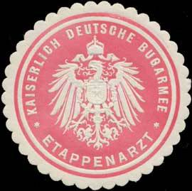 Sealing stamp Title: K. Deutsche Burgarmee Etappenarzt Description: Place: size: 4 cm